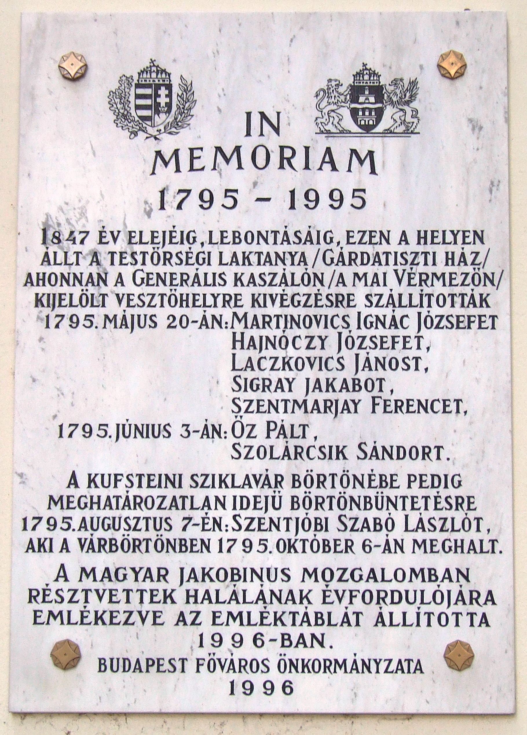 Magyar jakobinusok emléktáblája